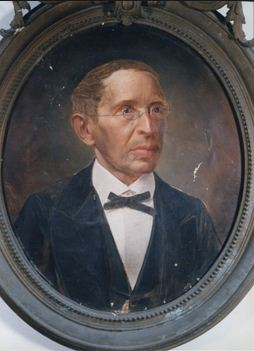 Senador Pompeu